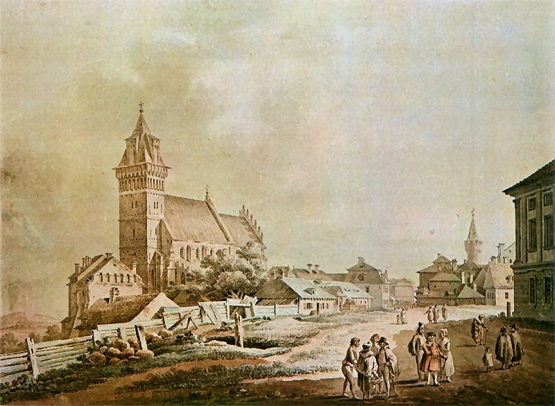 Widok Tarnowa ok. 1800 r. autorstwa Z. Vogla. Na pierwszym planie resztki rozebranej Bramy Krakowskiej, po lewej katedra z towarzyszącą zabudową, po prawej fragment pałacu (obecnie kamienica narożna przy Katedralnej i pl. Kazimierza Wielkiego.